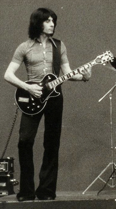 Тенко, по времето с Тангра